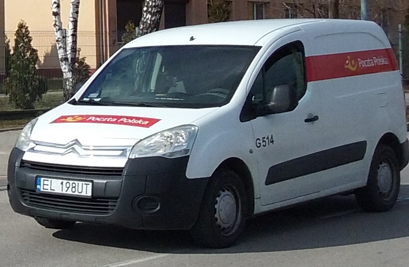 Tomaszów Mazowiecki w województwie łódzkim. PL, EU. Miejski samochód pocztowy Poczty Polskiej, CC0